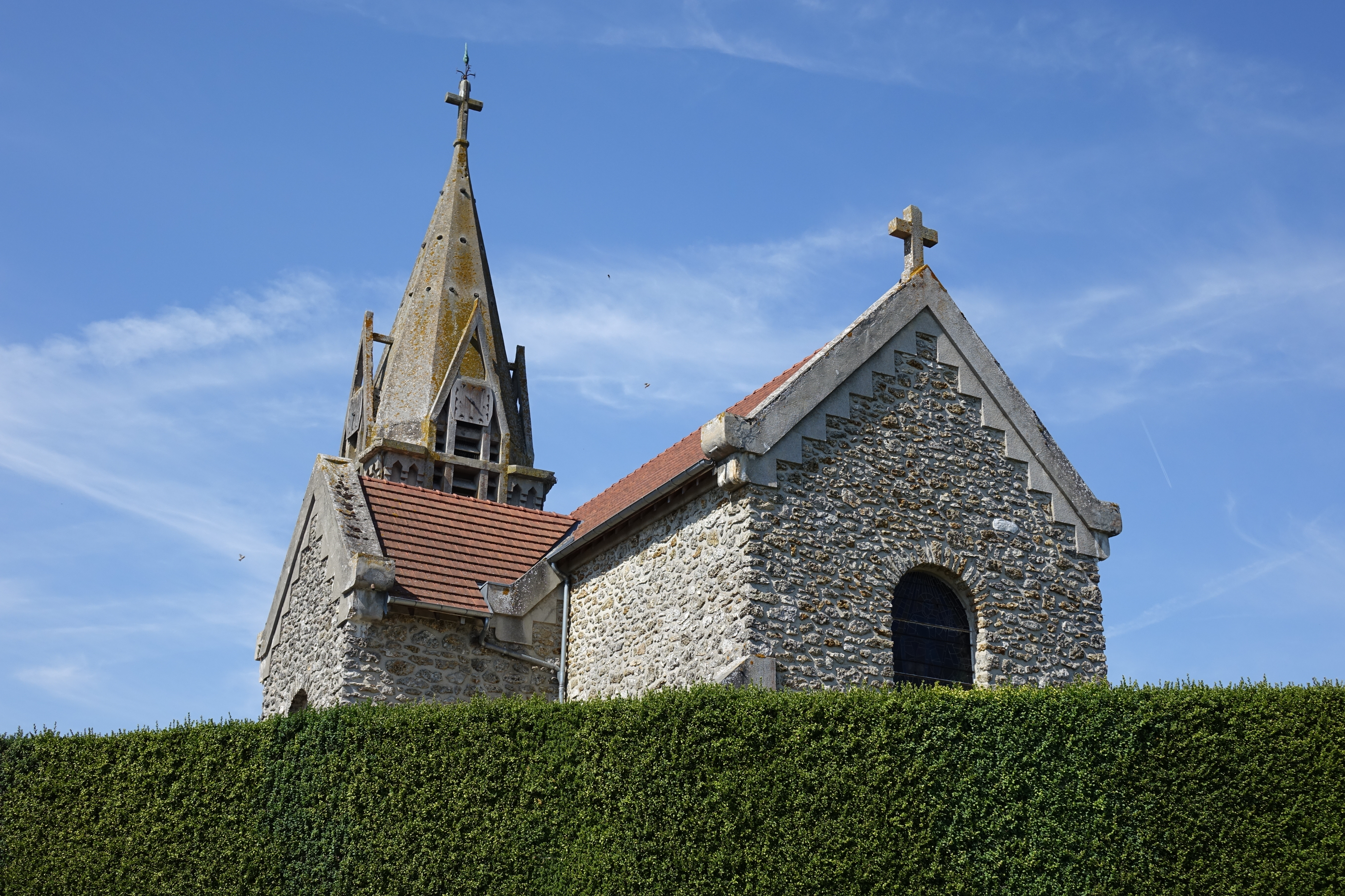 Église de Courmont, Aisne, France